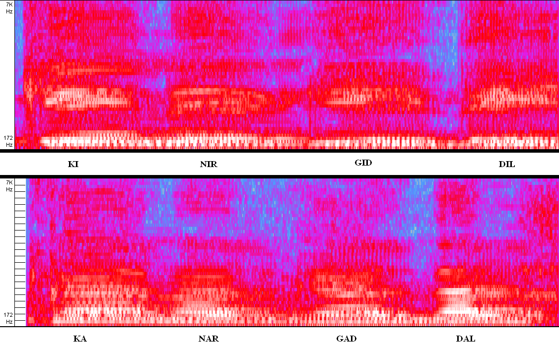 Spectrograms of "Kinir Gidil" (top) versus "Kanar Gadal" (bottom). Created using Audacity 1.2.6. ספקטרוגרמה של המילים "כיניר גידיל" (למעלה) ו"כאנאר גאדאל" (למטה). הפורמנט הראשון דומה ואילו הפורמנט השני גבוה יותר עבור "כיניר גידיל". מתוך העיבוד של להקת קצת אחרת לשיר שניים סינים עם כינור גדול.